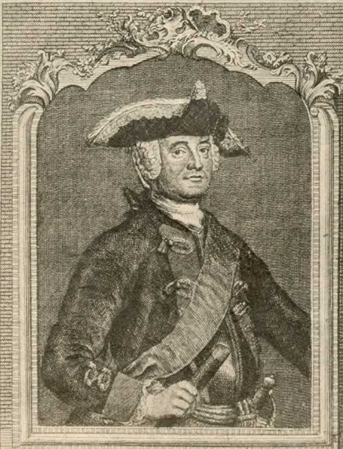 Moritz von Anhalt-Dessau (* 31. Oktober 1712; † 11. April 1760 in Dessau), preußischer Heerführer